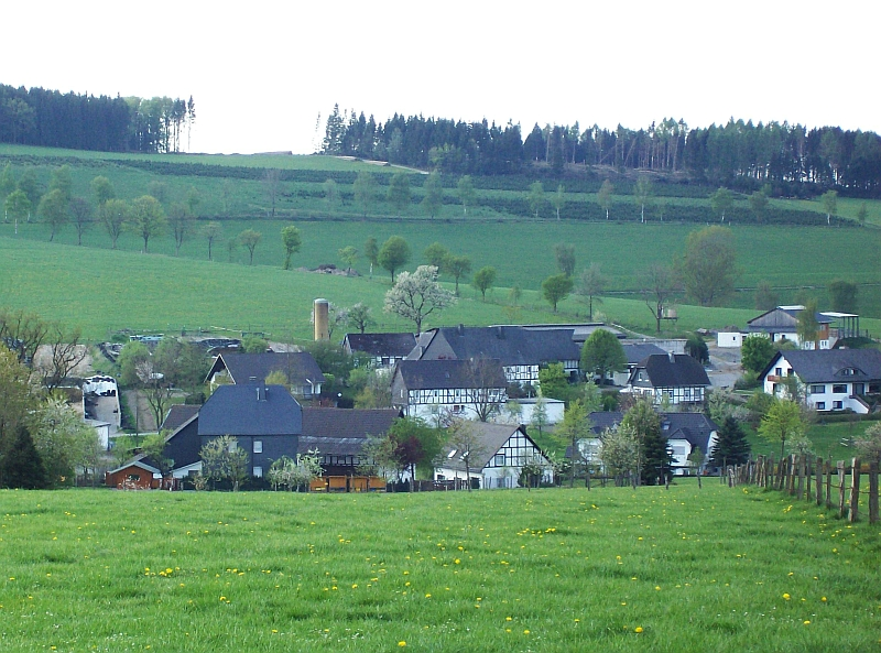 Selkentrop (Schmallenberg) , Germany.